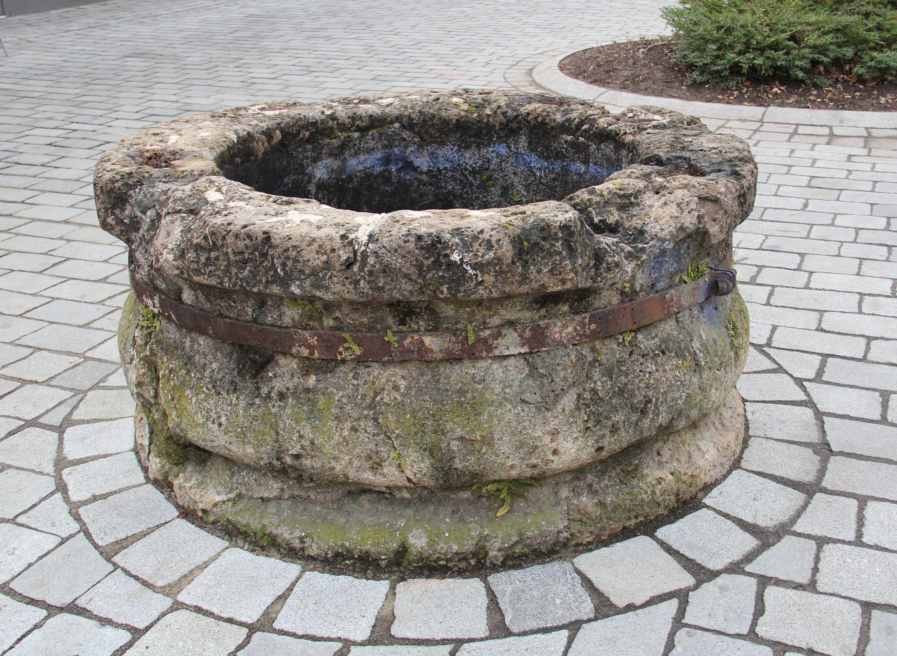 Brunnen, Frohnleiten, vor Hauptplatz 30